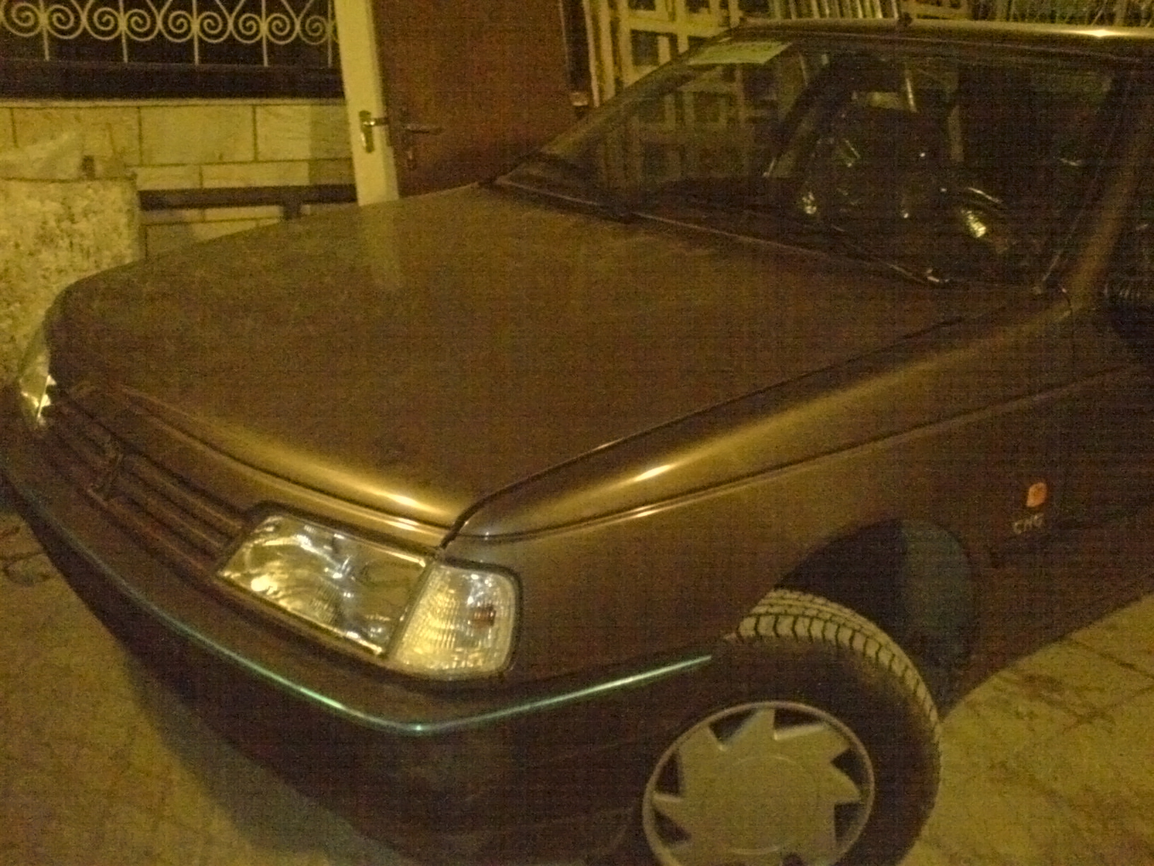 Roa front side view